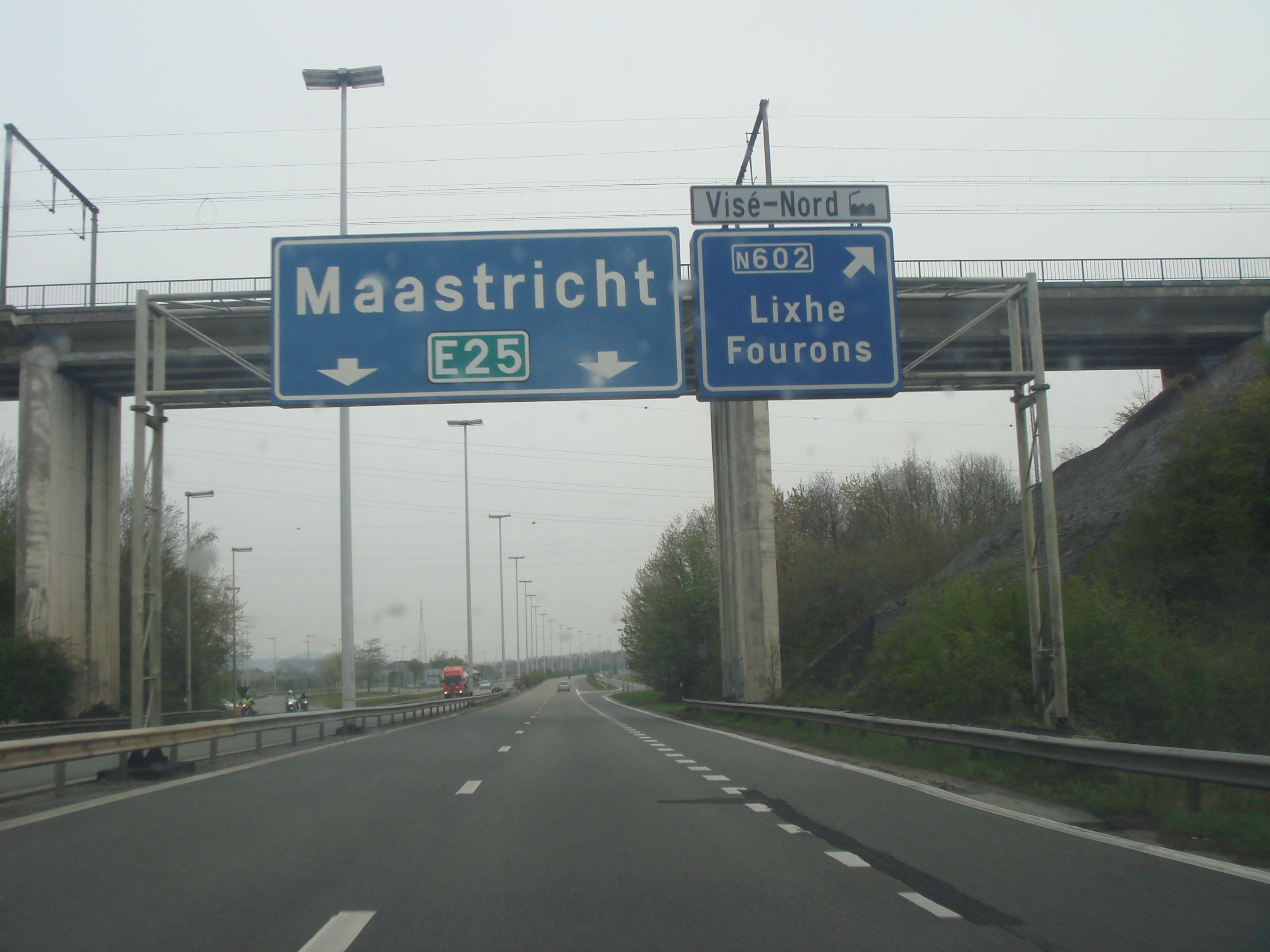 Autoroute E25 à la frontière entre les Pays-Bas et la Belgique